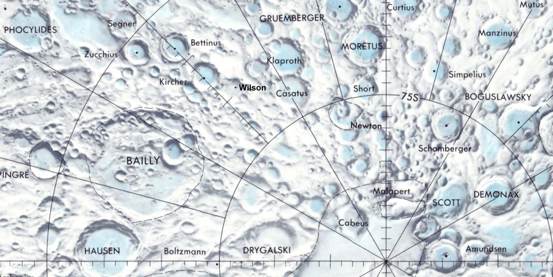 Cráter lunar Wilson. Localización. (Lunar Chart LPC1. Second Edition)